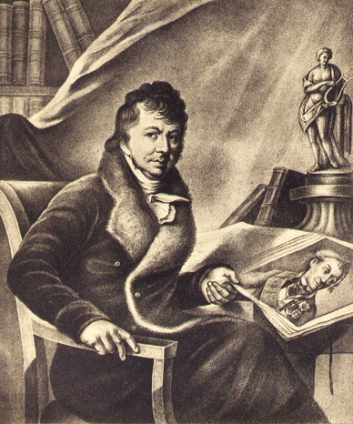 Портрет Платона Петровича Бекетова (1761-1836).